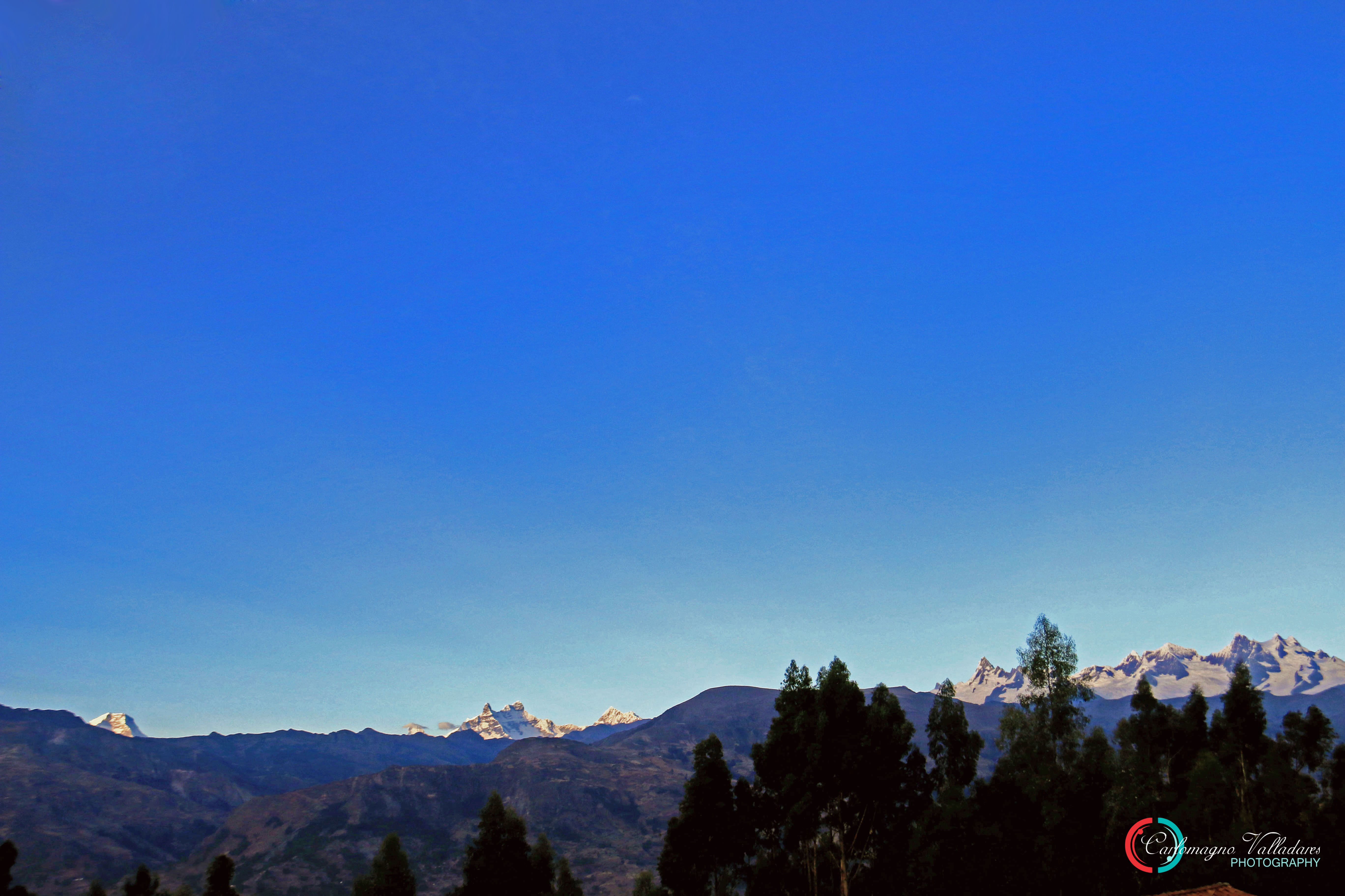 Hilera de los Andes Peruanos